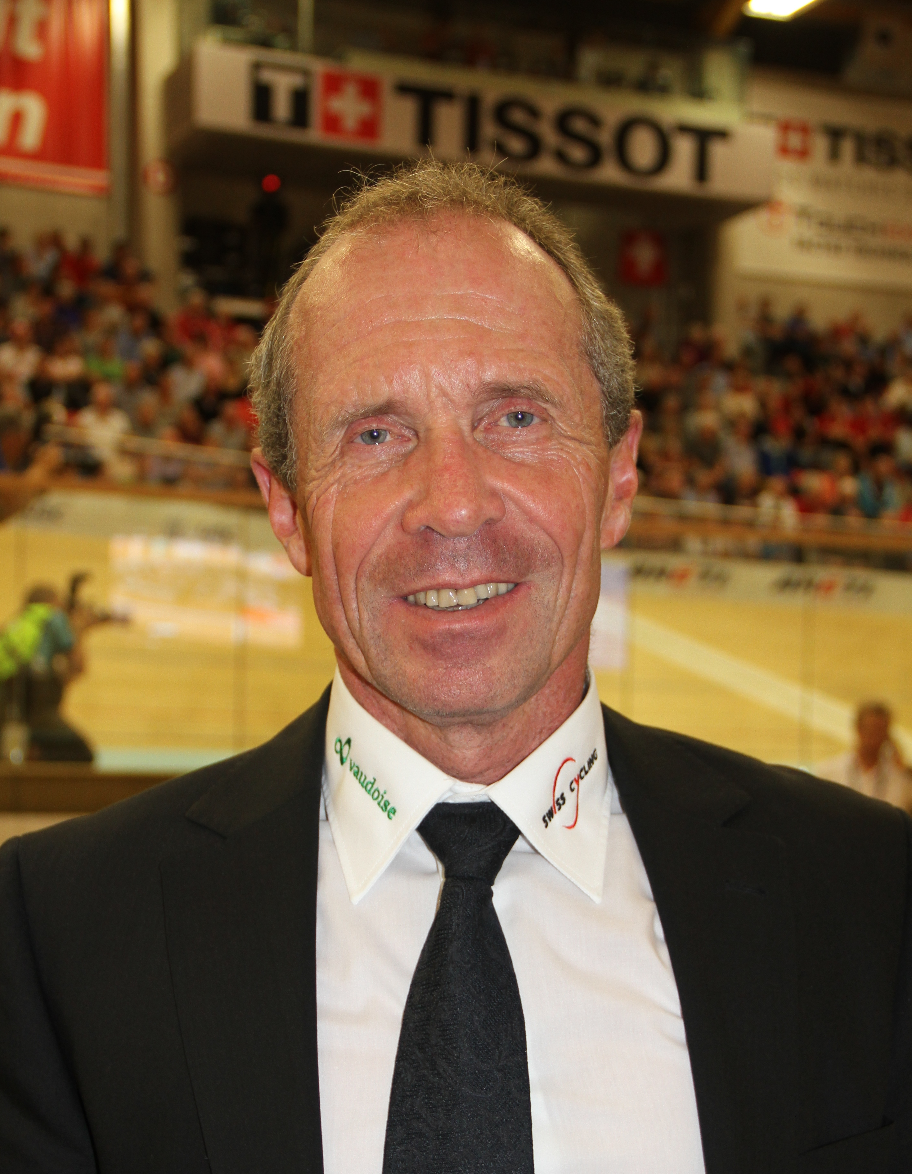 Franz Gallati, Präsident von Swiss Cyclig The making of this document was supported by the Community-Budget of Wikimedia Germany.